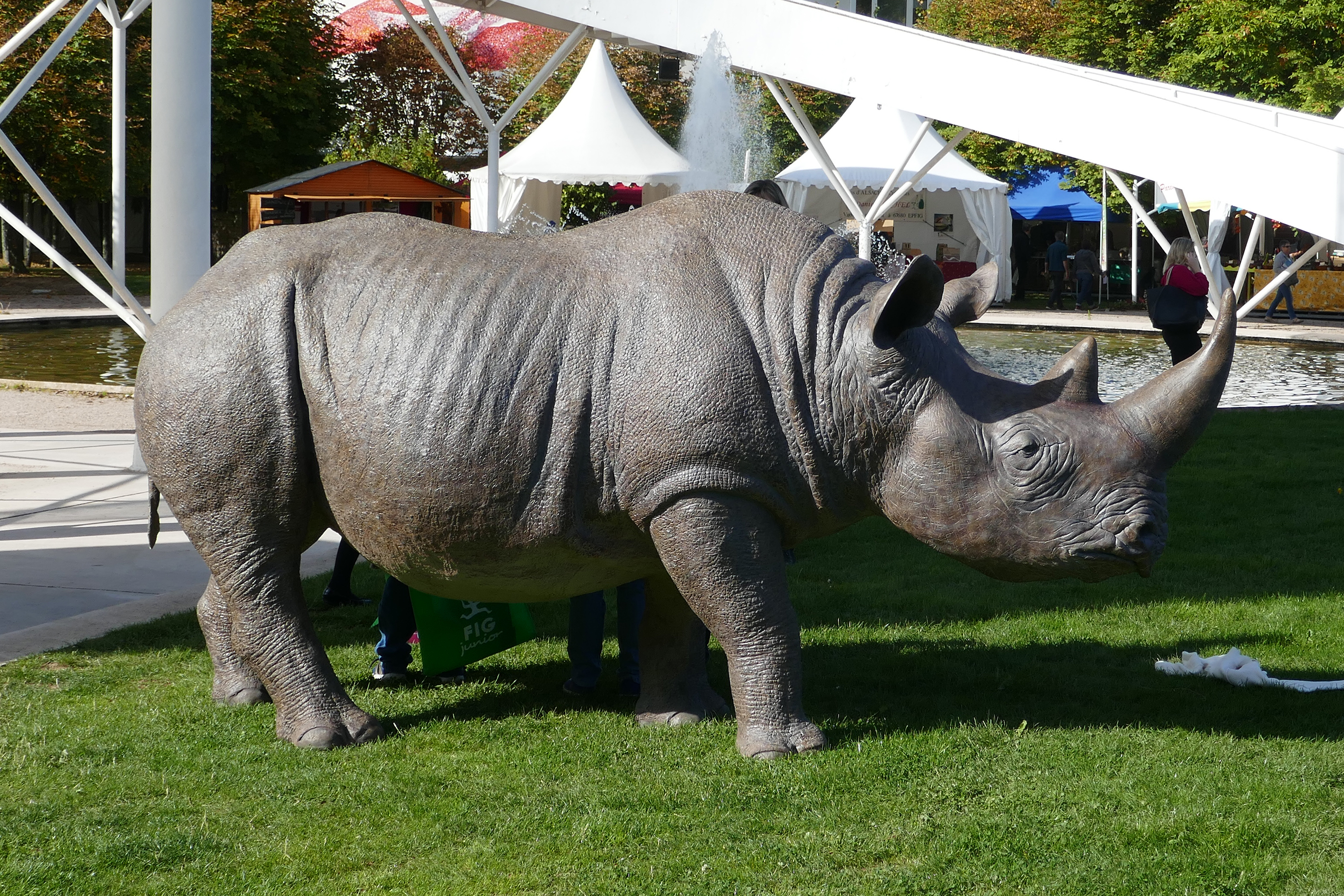 Les animaux (thème) et l'Afrique du Sud (pays invité), à l'honneur au Festival international de géographie 2017.